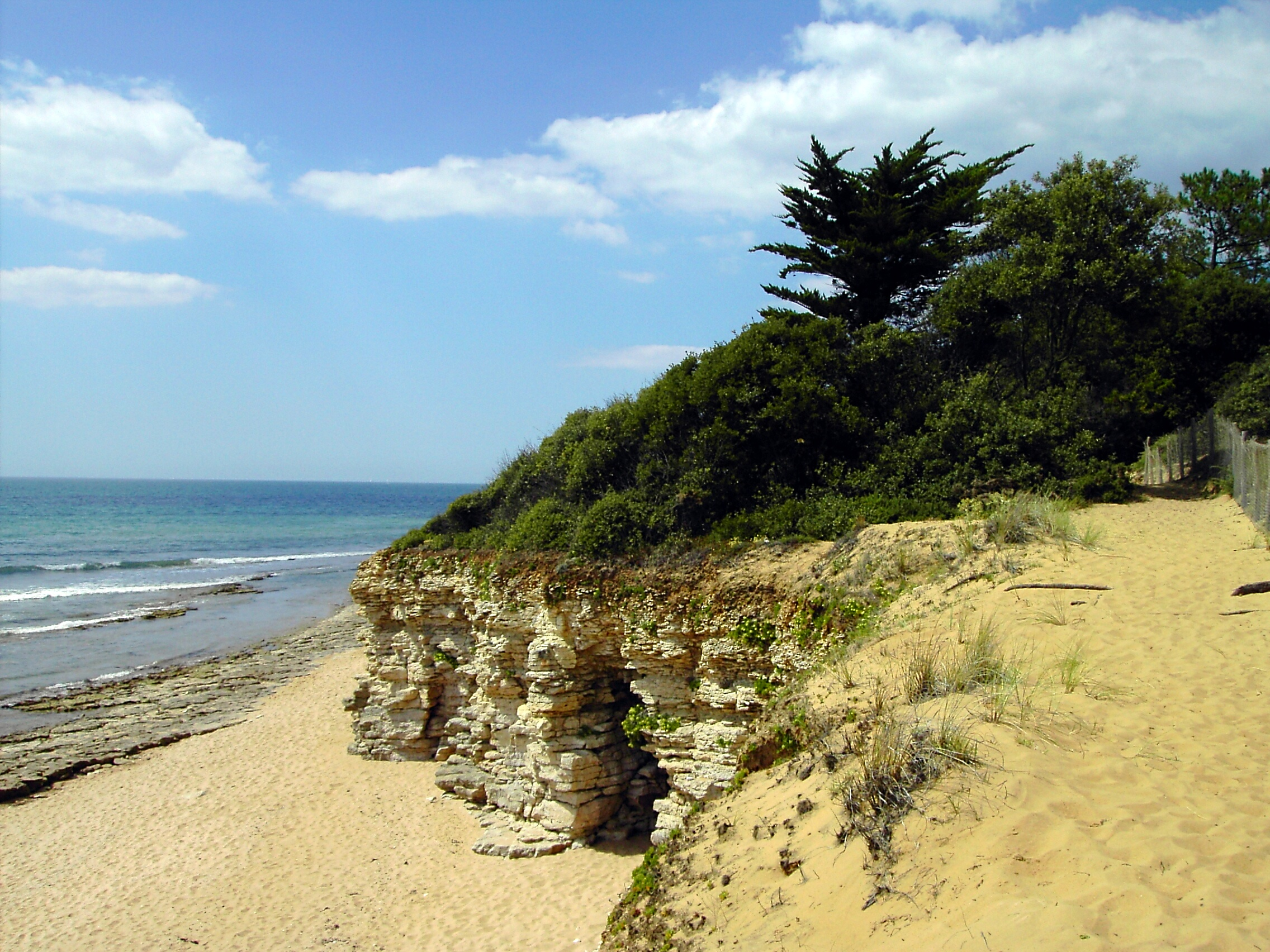 Jard-sur-mer: la cote